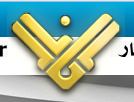 аль-манар